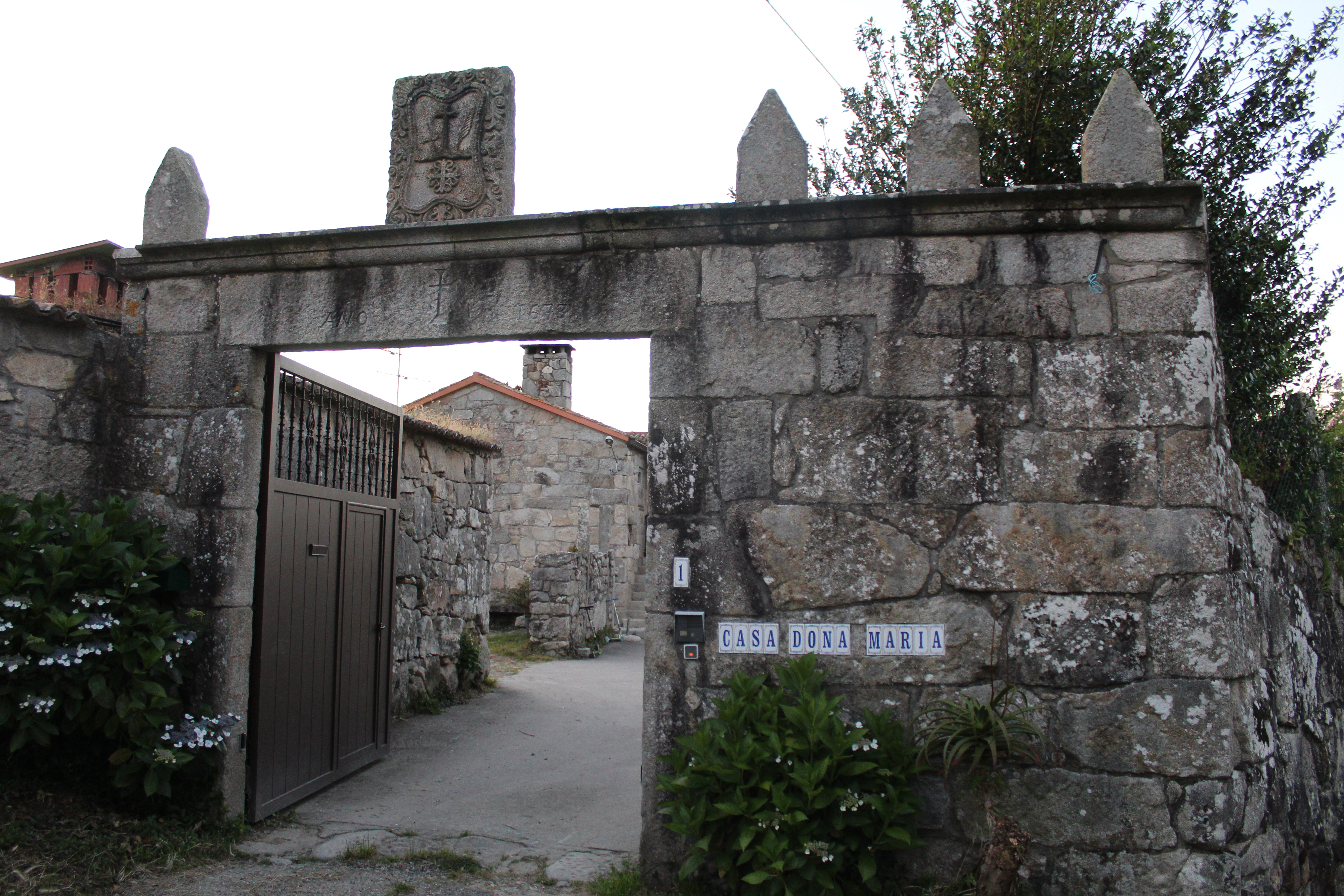 Casa de Dona María é unha casa grande galega de Cristillón, concello de Gondomar